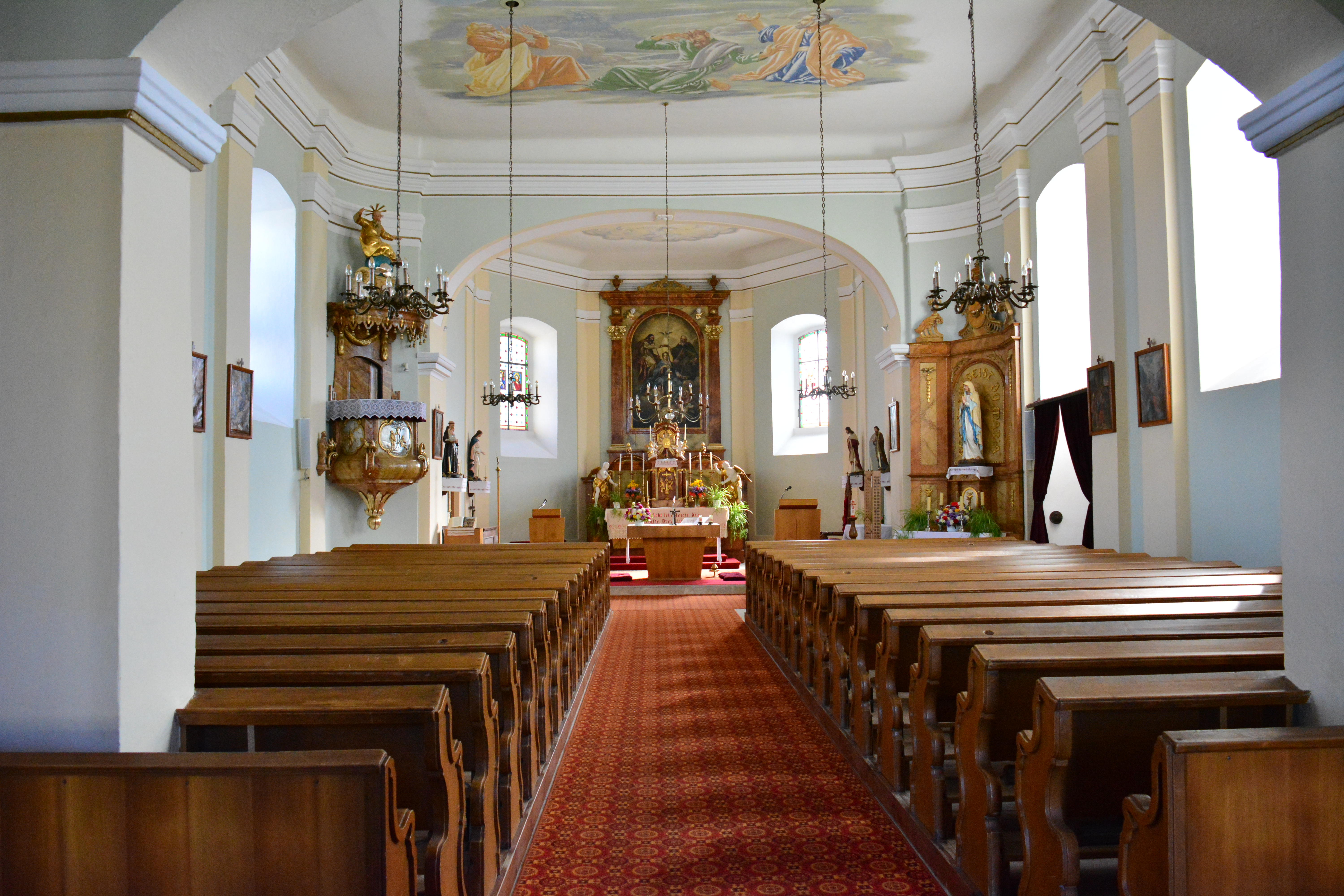 Kath. Pfarrkirche Hl. Dreifaltigkeit in Reingers im Waldviertel - Blick zum Altar